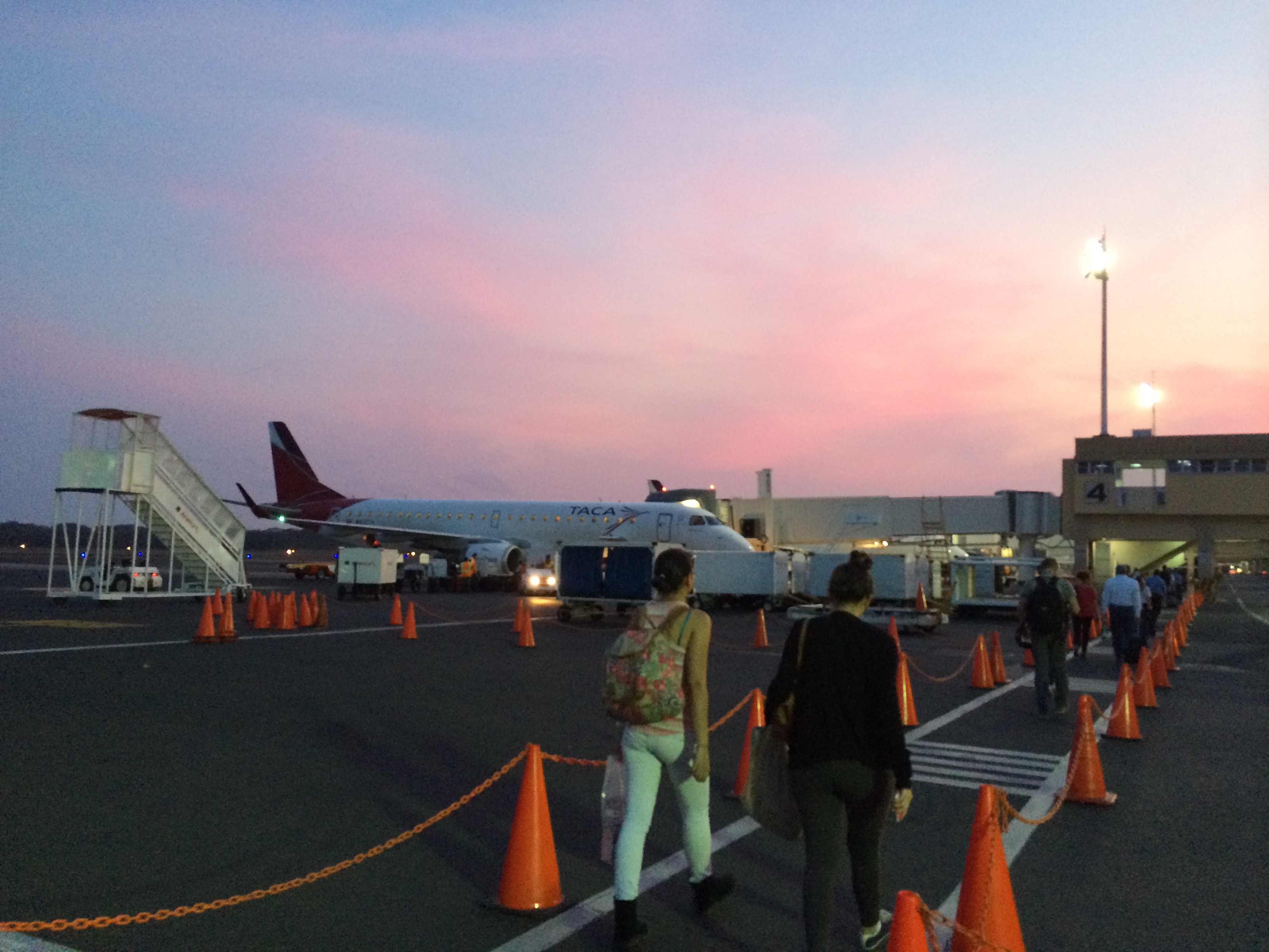 Puerta 4 del Aeropuerto de San Salvador.